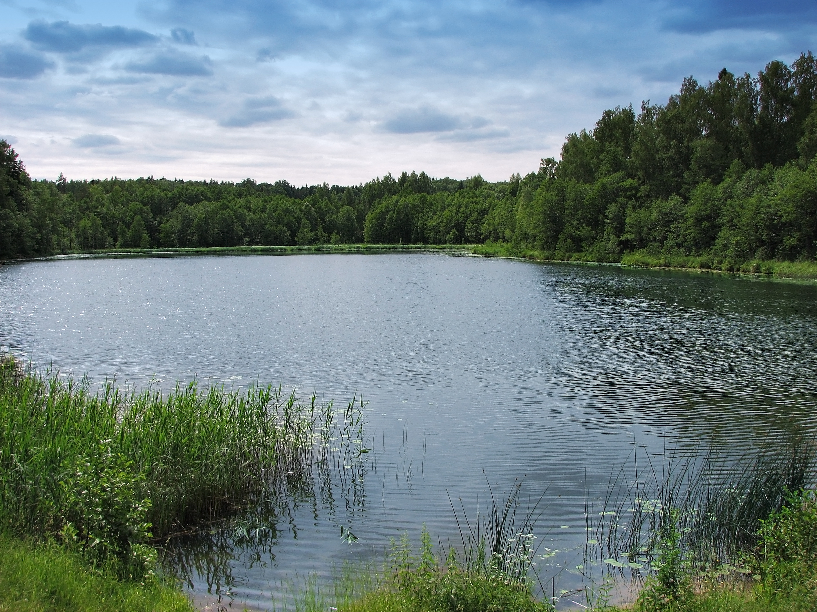 Kalkūne Parish, Latvia